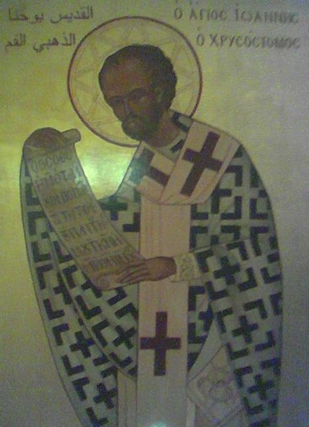 Saint Jean Chrysostome, icône de l'iconostase de l'Église de St Jean Chrysostome d'Etterbeek.